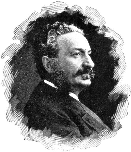 Diomede Marvasi (1827-1875)